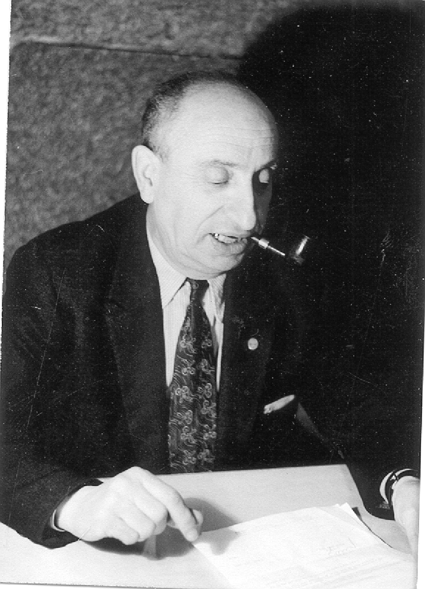 יקיר הר-זהב - דיוקן - בסביבות 1960